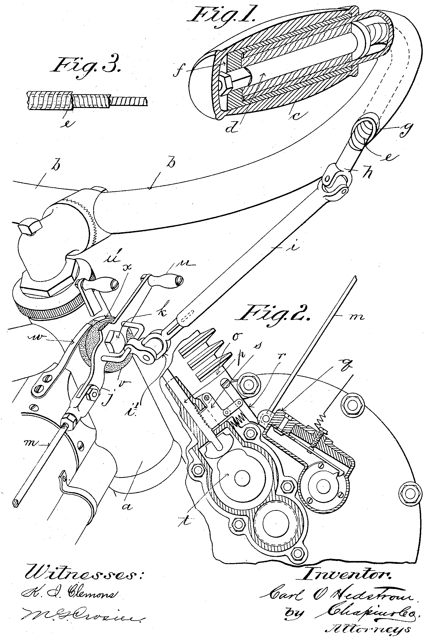 Twistgrip - Patent Drawing